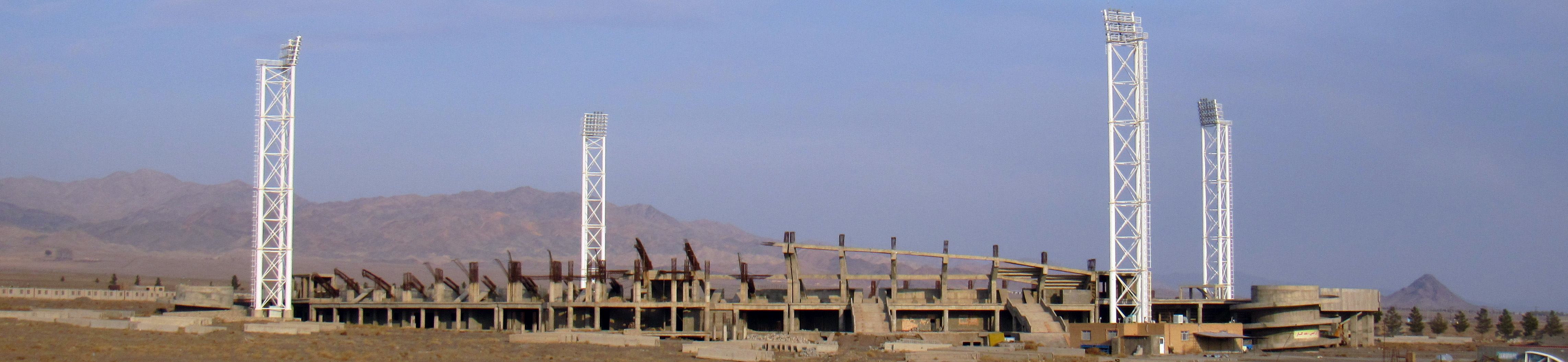 ...استادیوم پانزده هزار نفری سربداران سبزوار - در حال ساخت